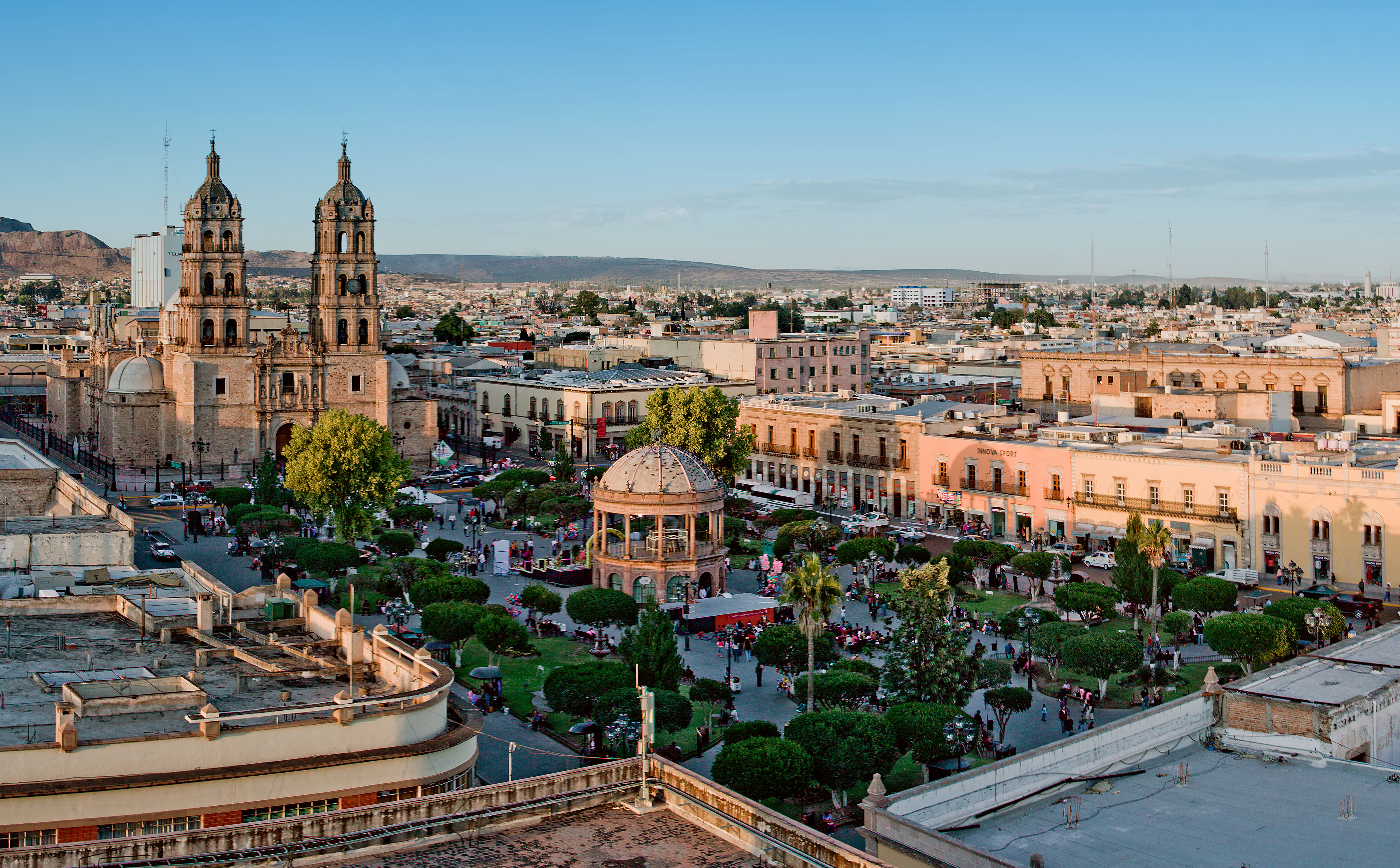 Duraznské náměstí v Mexiku